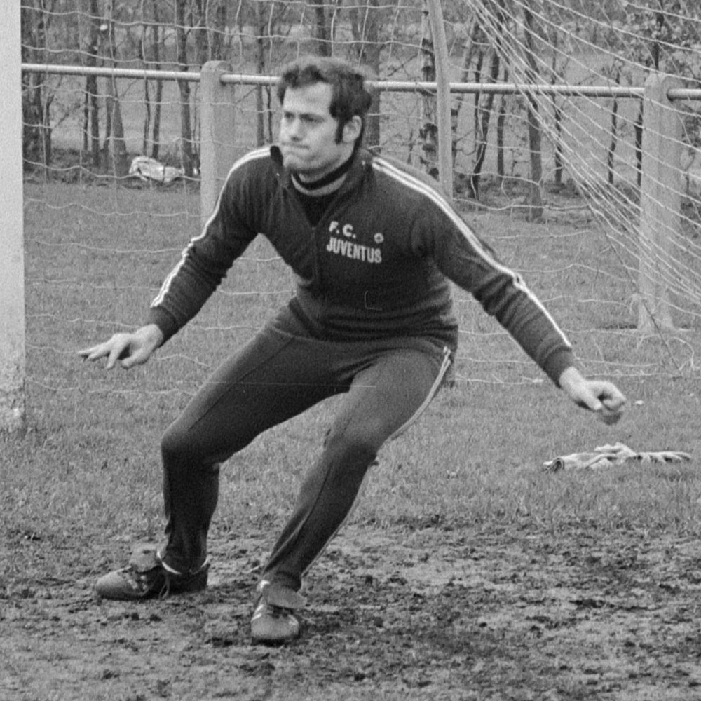 Voetbalclub Juventus (Italie) traint in Enschede; Massimo Piloni.